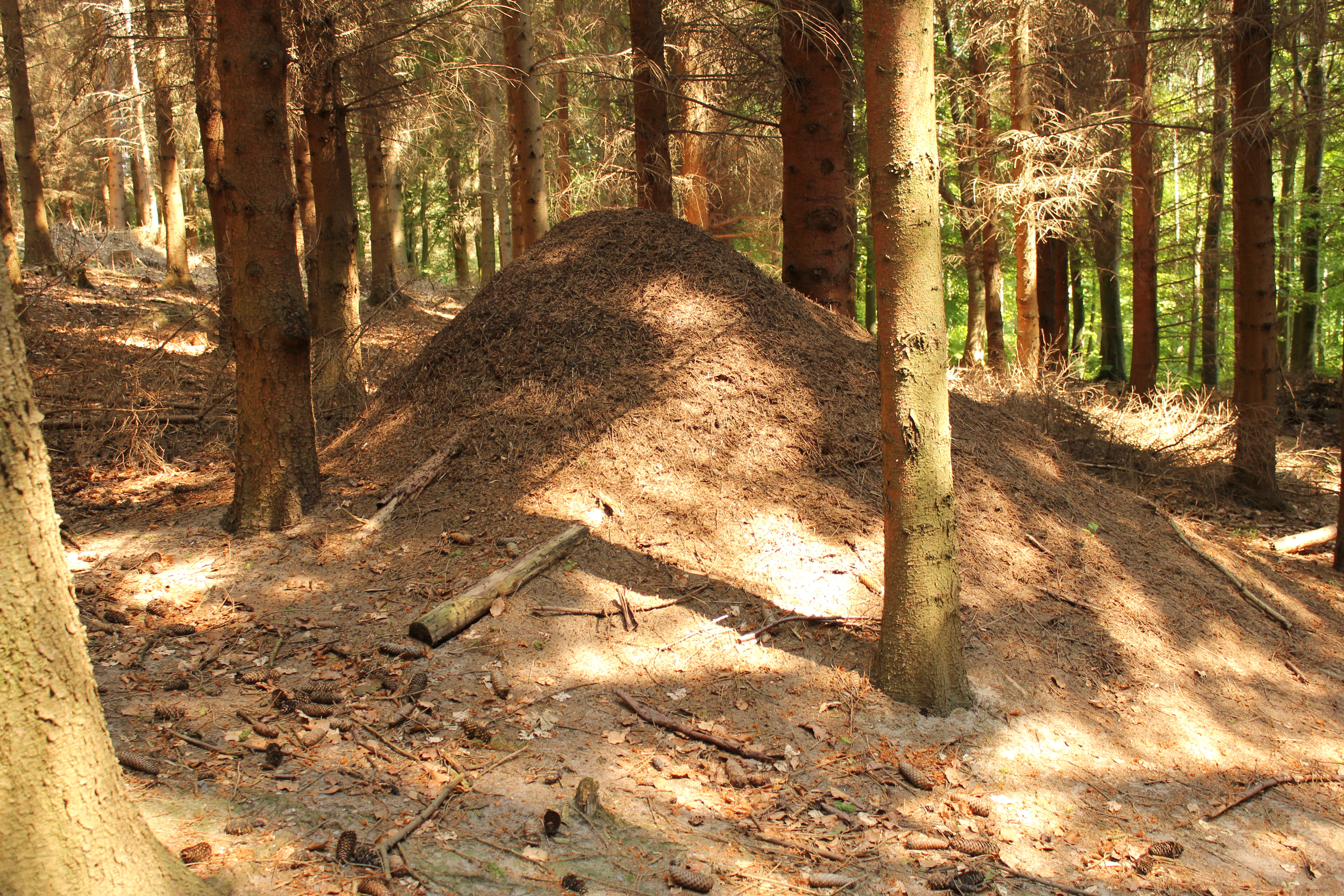 Formica rufa nest